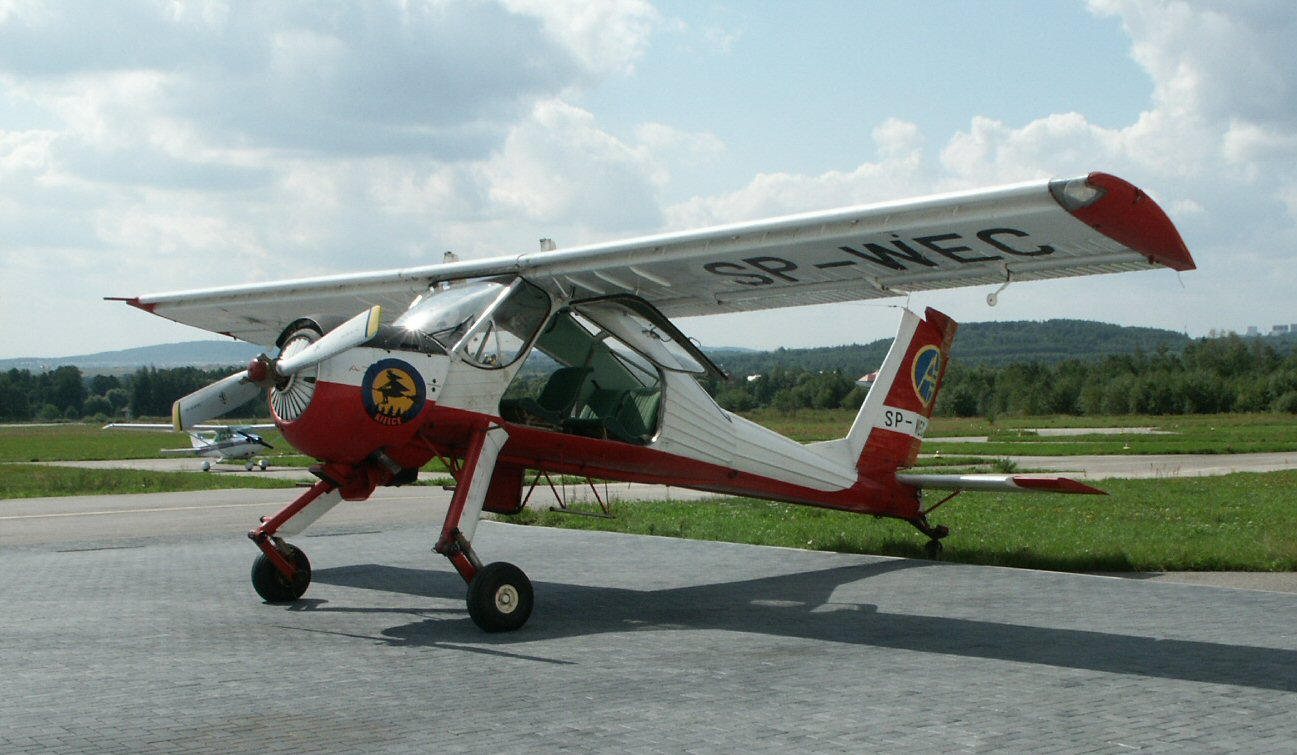 PZL-104 Wilga 35 (SP-WEC) of Aeroklub Kielecki at Kielce-Masłów Airport